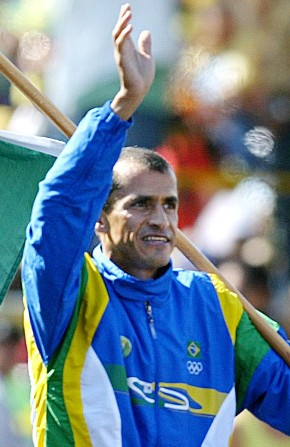 Brasília - O maratonista Vanderlei Cordeiro de Lima desfila com a bandeira do Brasil,durante comemoração do Dia da Independência, na Esplanada dos Ministérios.